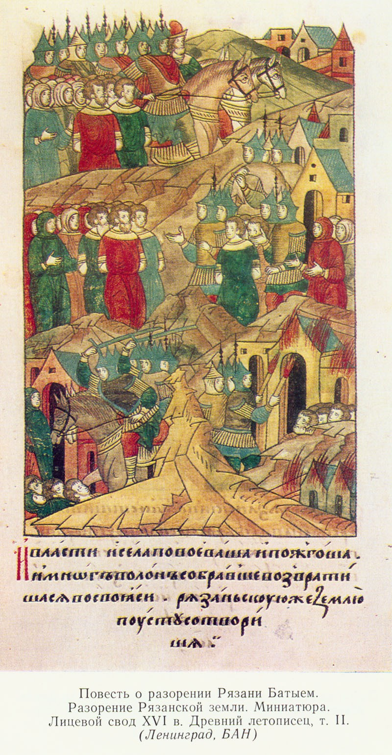 Повесть о разорении Рязани Батыем. Миниатюра. Лицевой свод XVI в. Древний летописец, т. II. (Санкт-Петербург, БАН)